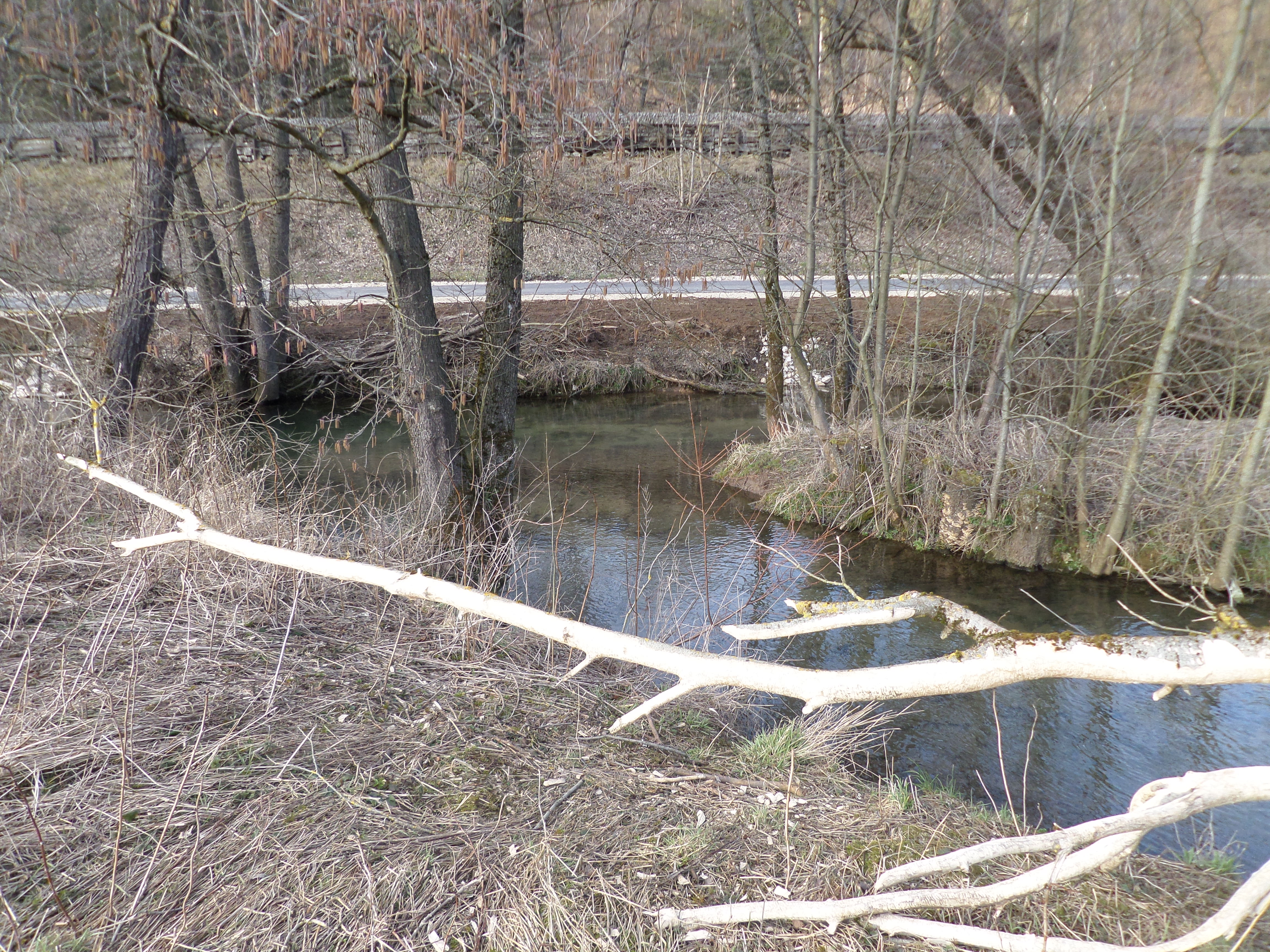 Högenbach an der Mündung des Etzelbachs (oben)